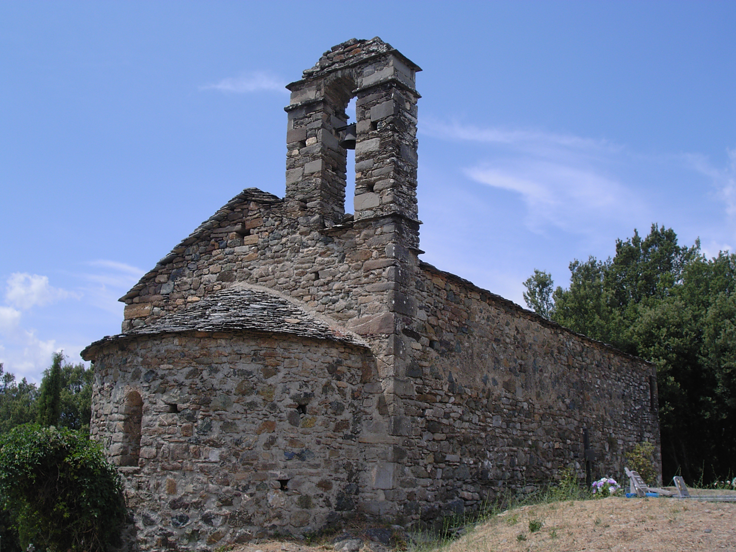 La chapelle Saint-Nicolas de Sermano